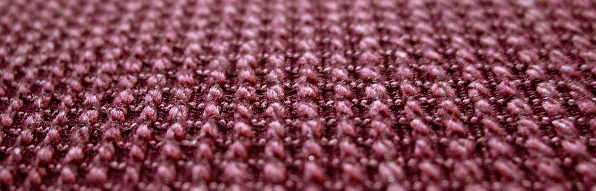 Cotton davenport